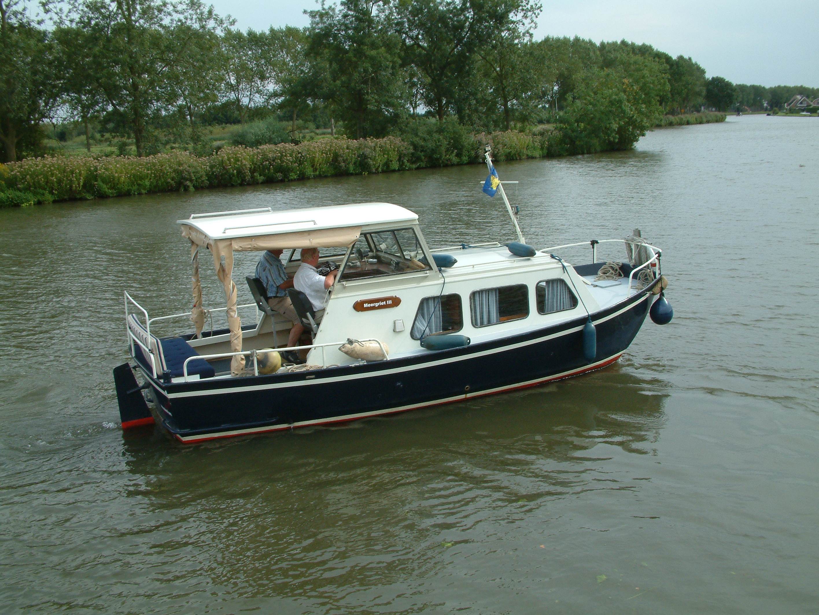 Doerak 700 op het Merwedekanaal in Meerkerk